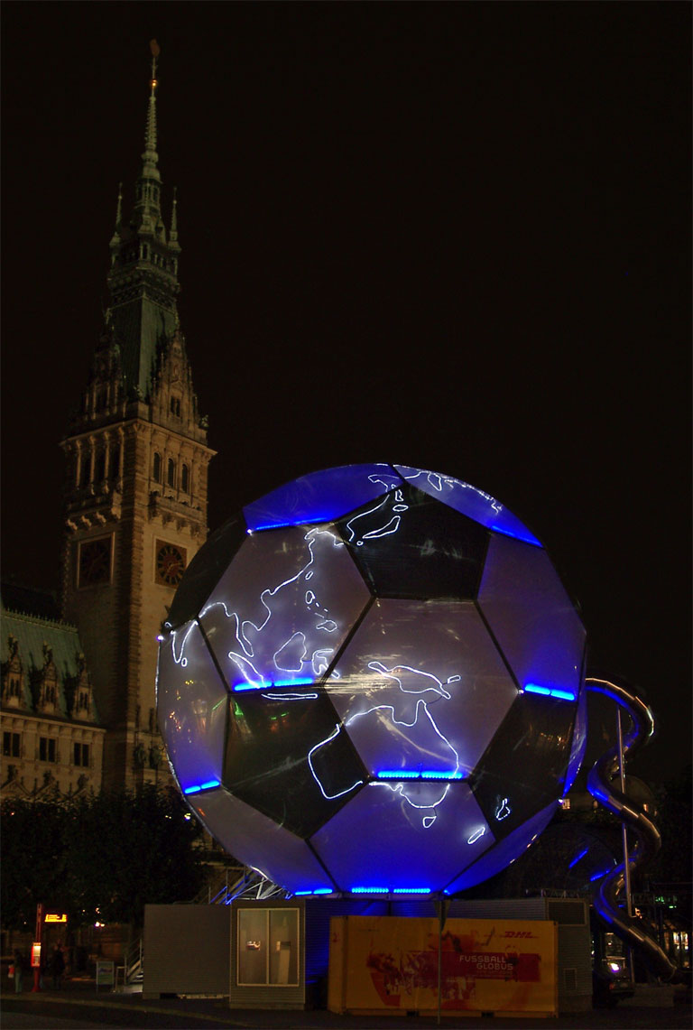 Der Fußball-Globus ist ein Kunst- und Kulturobjekt im Rahmen des Kulturprogramms der Fußball-Weltmeisterschaft 2006 in Deutschland.